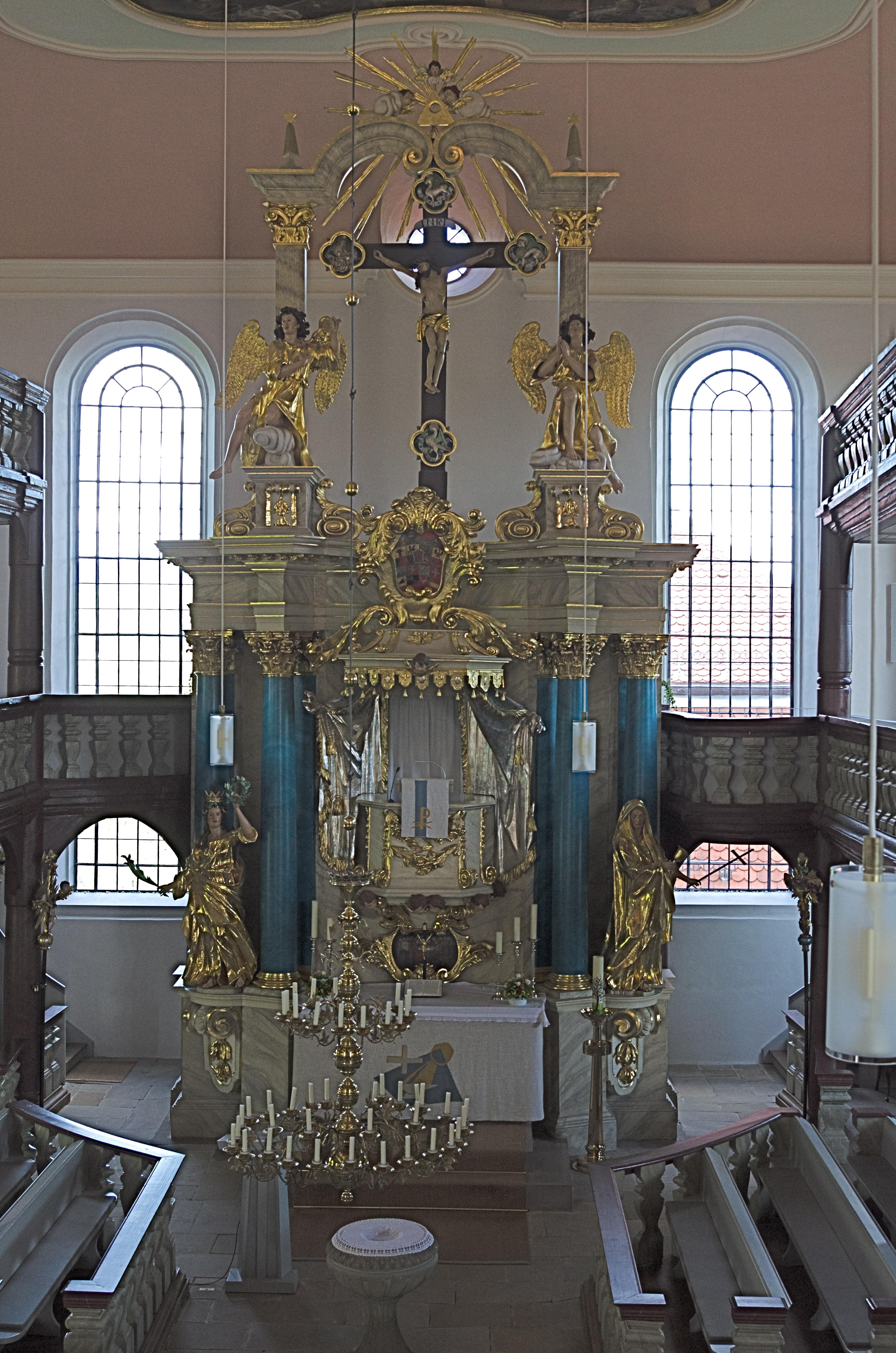 Weidenberg, Gurtstein 13, Ev. Pfarrkirche